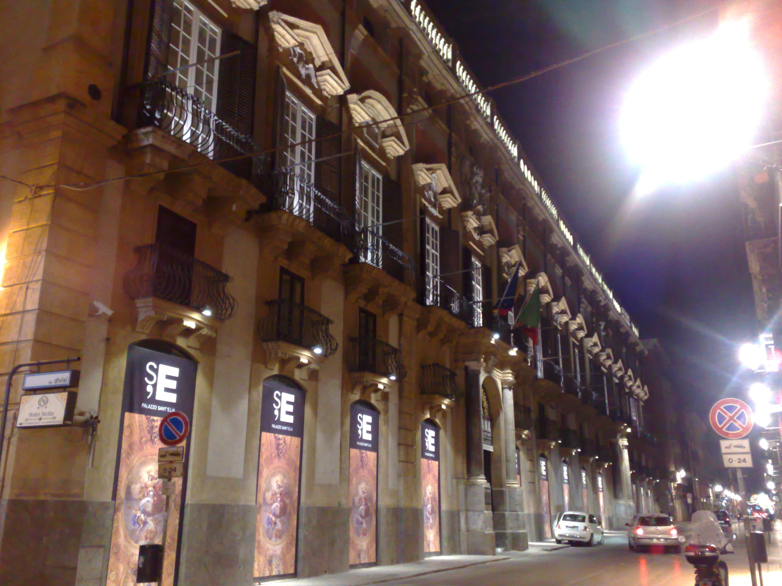 Palazzo Sant'Elia (via Maqueda, Palermo)